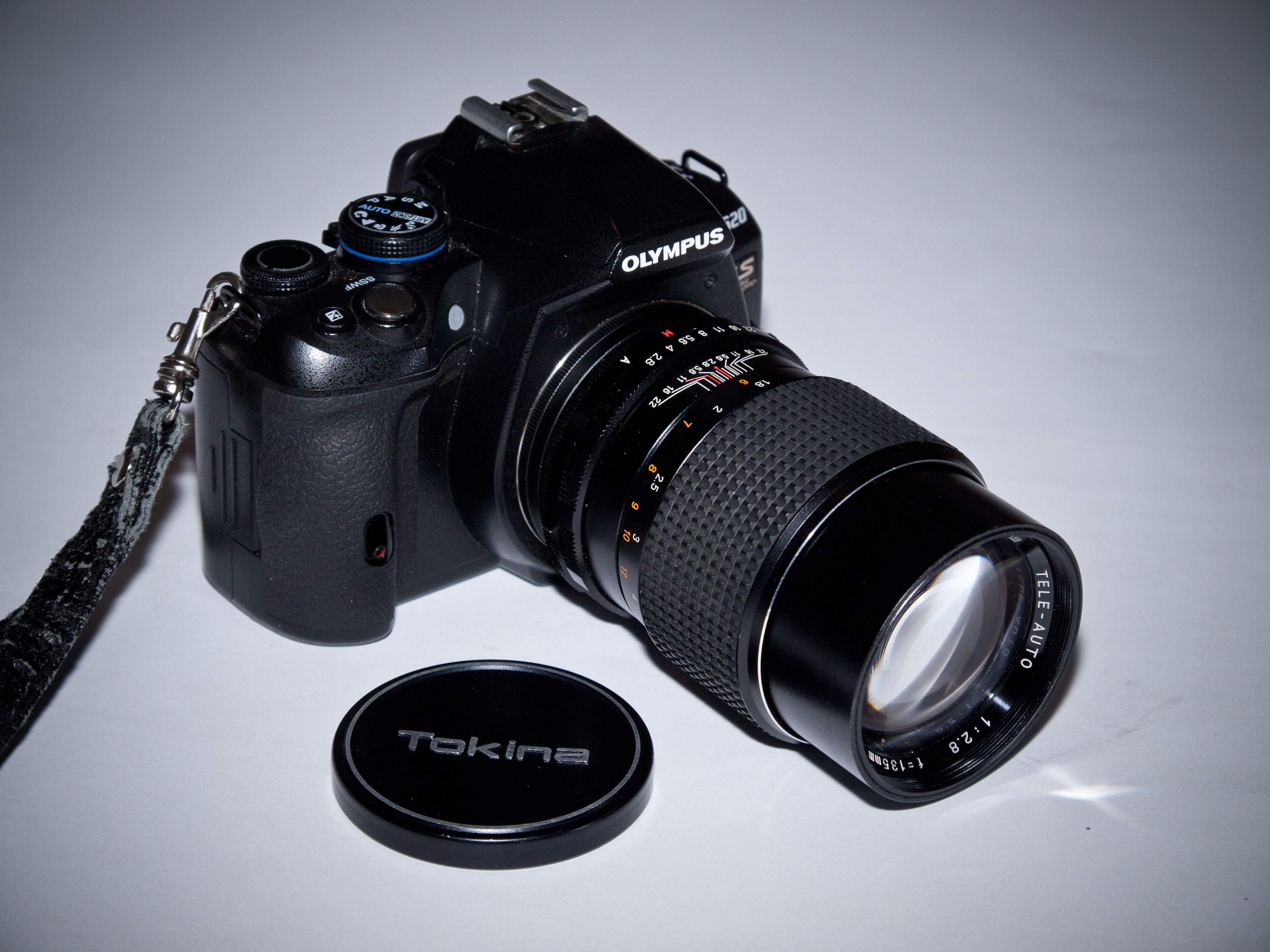 Tokina 135mm f2.8 lens op een Olympus E620 body.